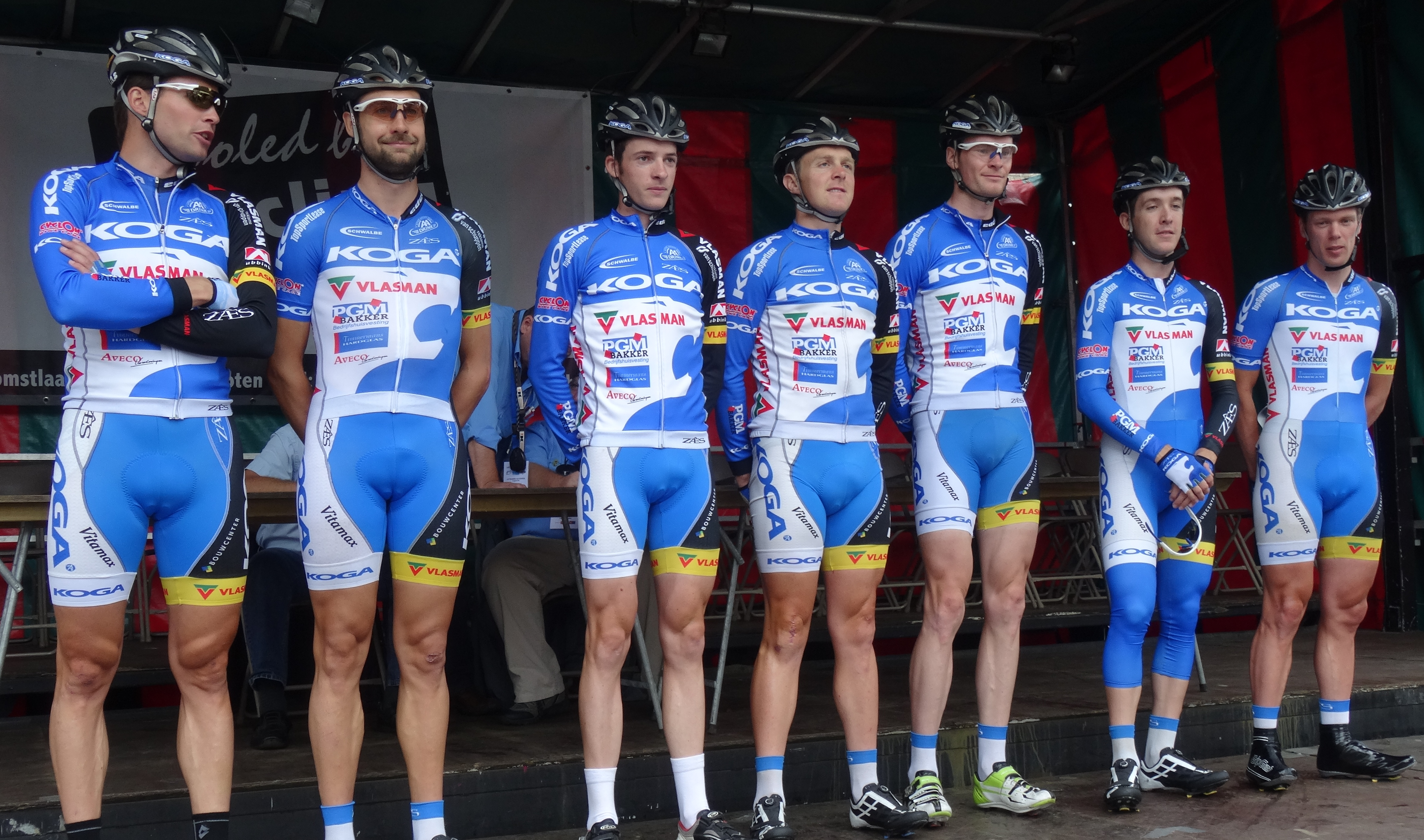 Reportage photographique réalisé le dimanche 10 août à l'occasion du départ et de l'arrivée de la Flèche du port d'Anvers 2014 à Merksem (Anvers), Belgique.